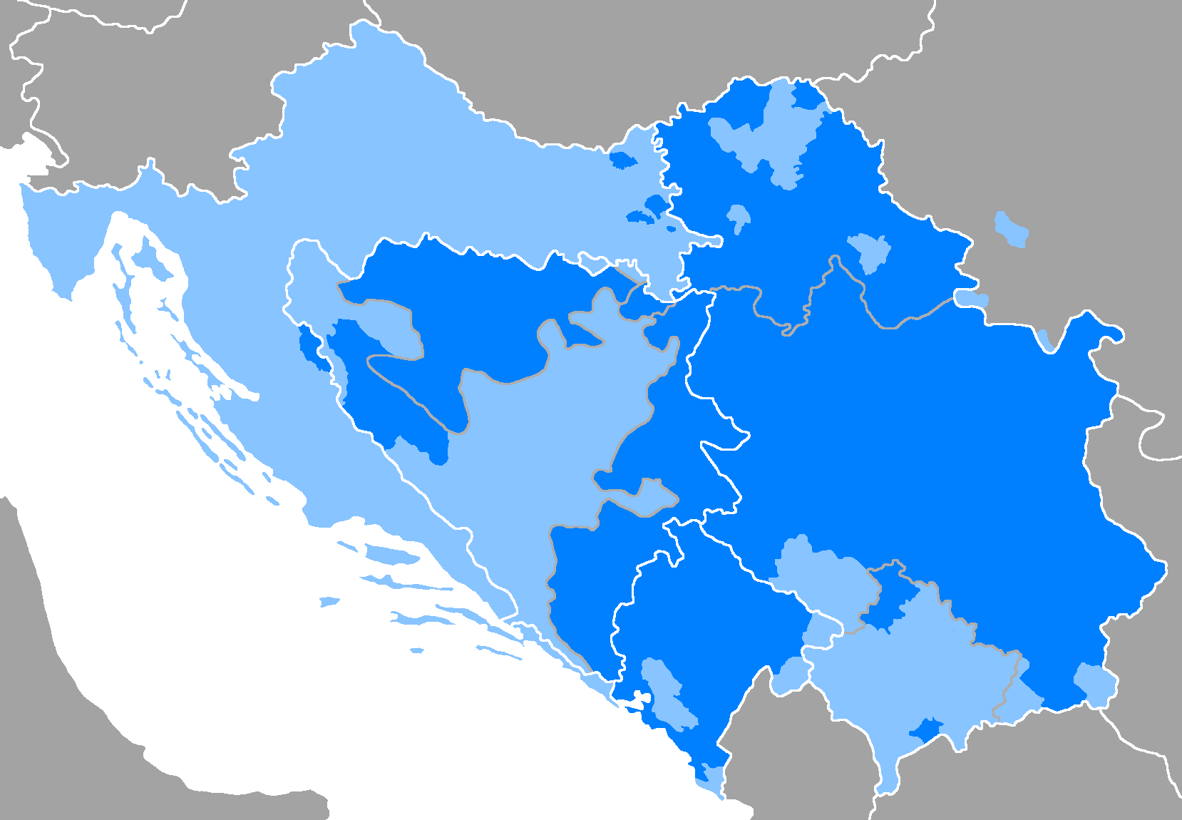 Idioma serbio Donde es hablado Resto de hablas serbocroatas